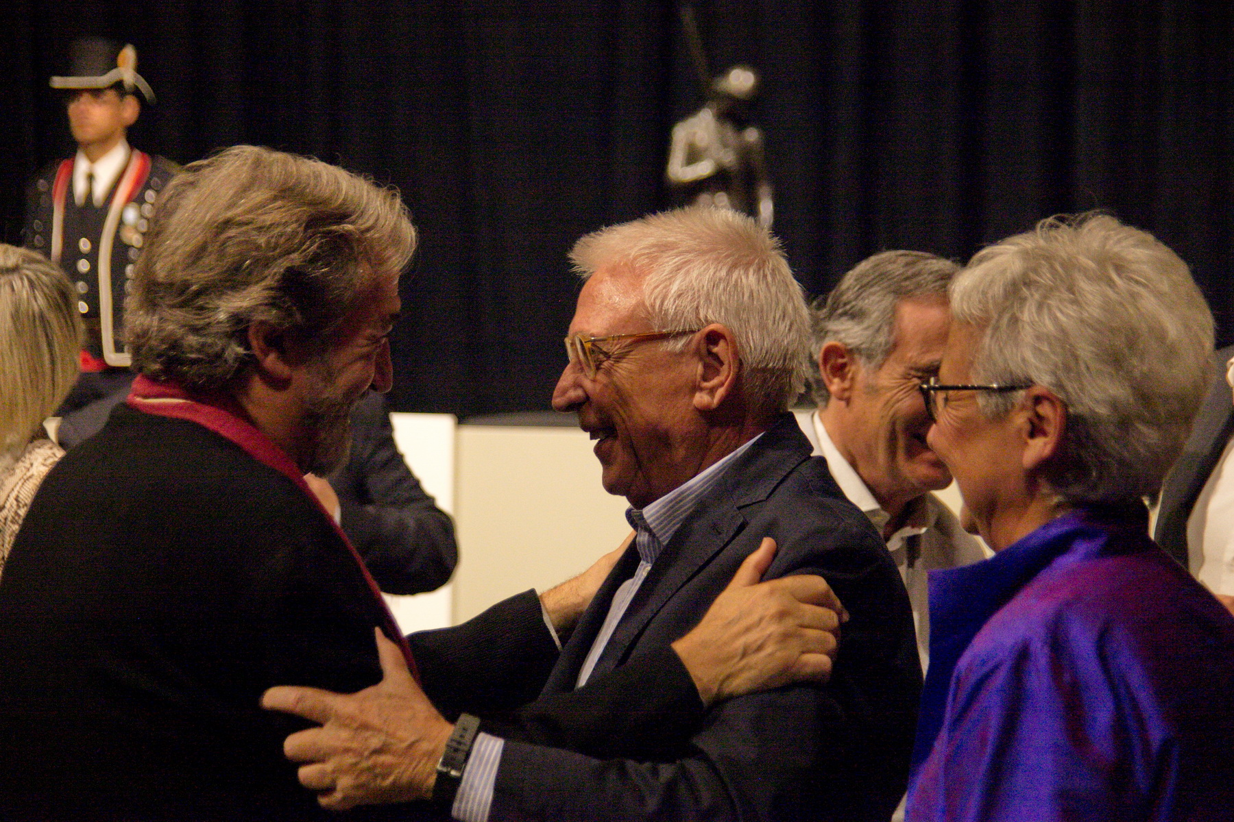 Acte de lliurament de la Medalla d'Or de la Generalitat de Catalunya a Jordi Savall. Barcelona, 17-10-2014